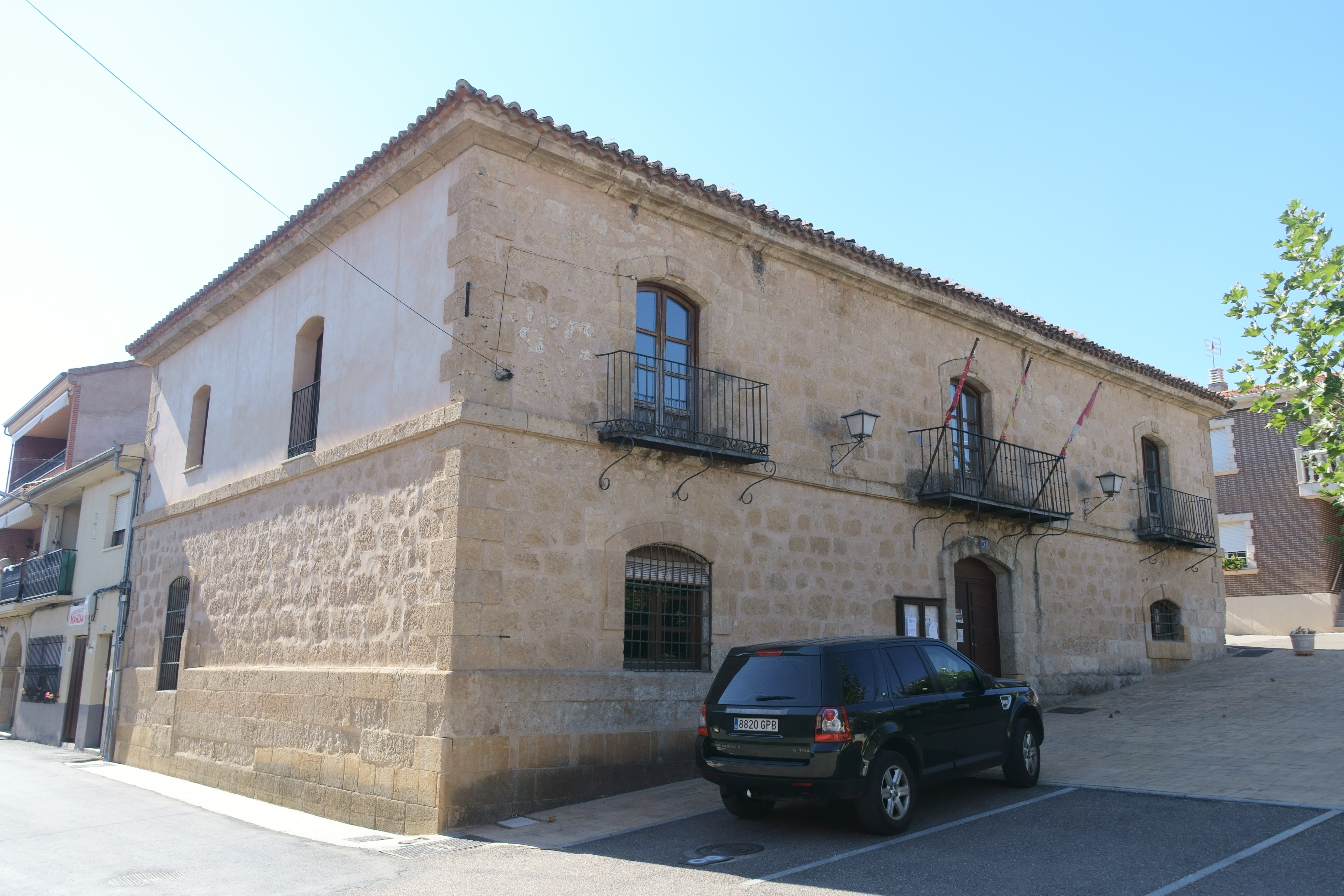 Casa consistorial de Villamor de los Escuderos (Zamora, España).